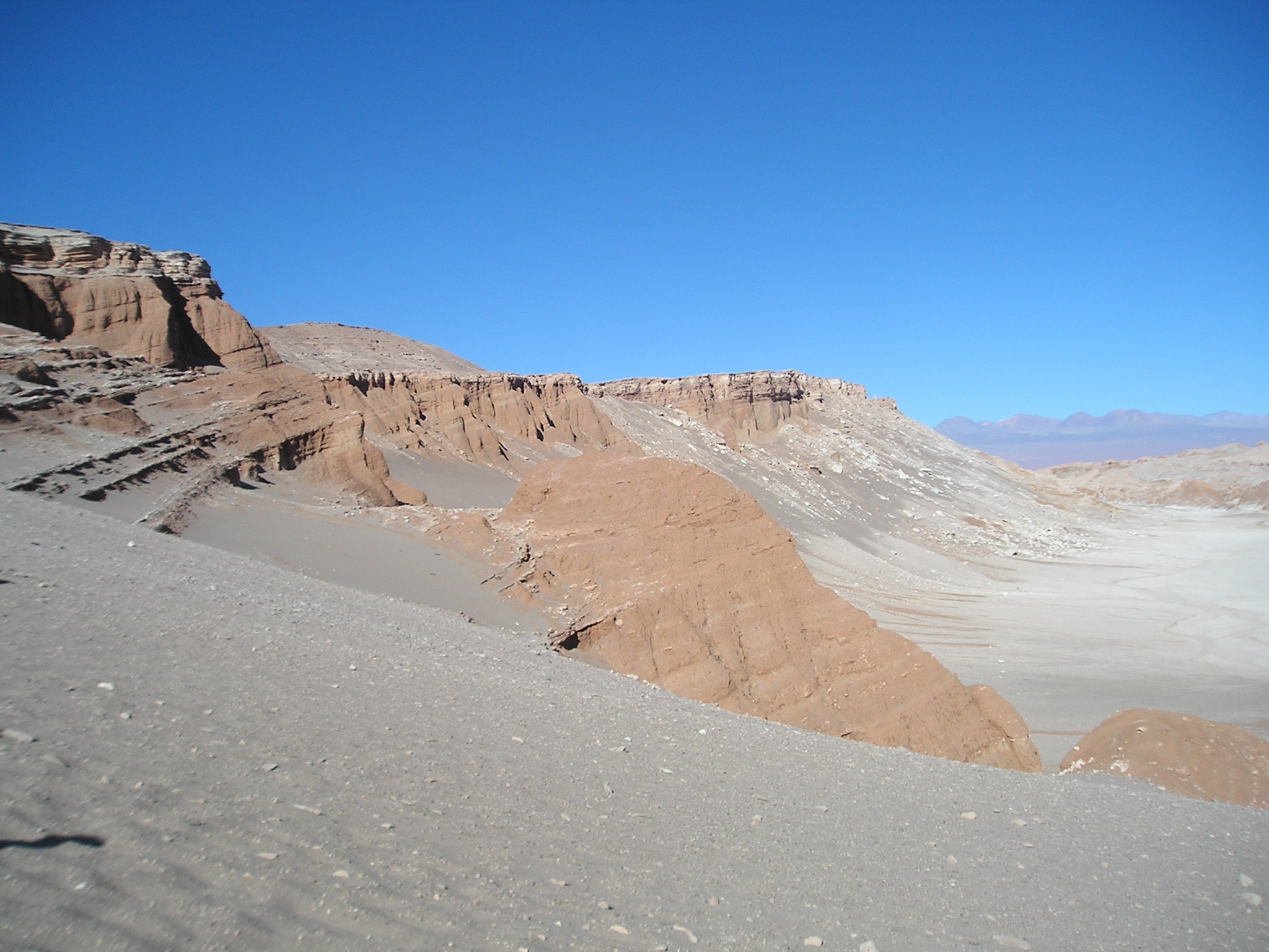 A descent into Valle de la Luna near San Pedro de Atacama, Chile